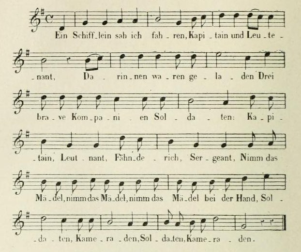 La chanson populaire "Ein Schifflein Sah Ich Fahren" par J.B. Weckerlin. Firmin-Didot éditeur, Paris 1886, page 54. Air traditionnel de Westphalie et paroles d'une chanson populaire . Cet air a été repris pour La Parisienne chanson de Casimir Delavigne datant de 1830.